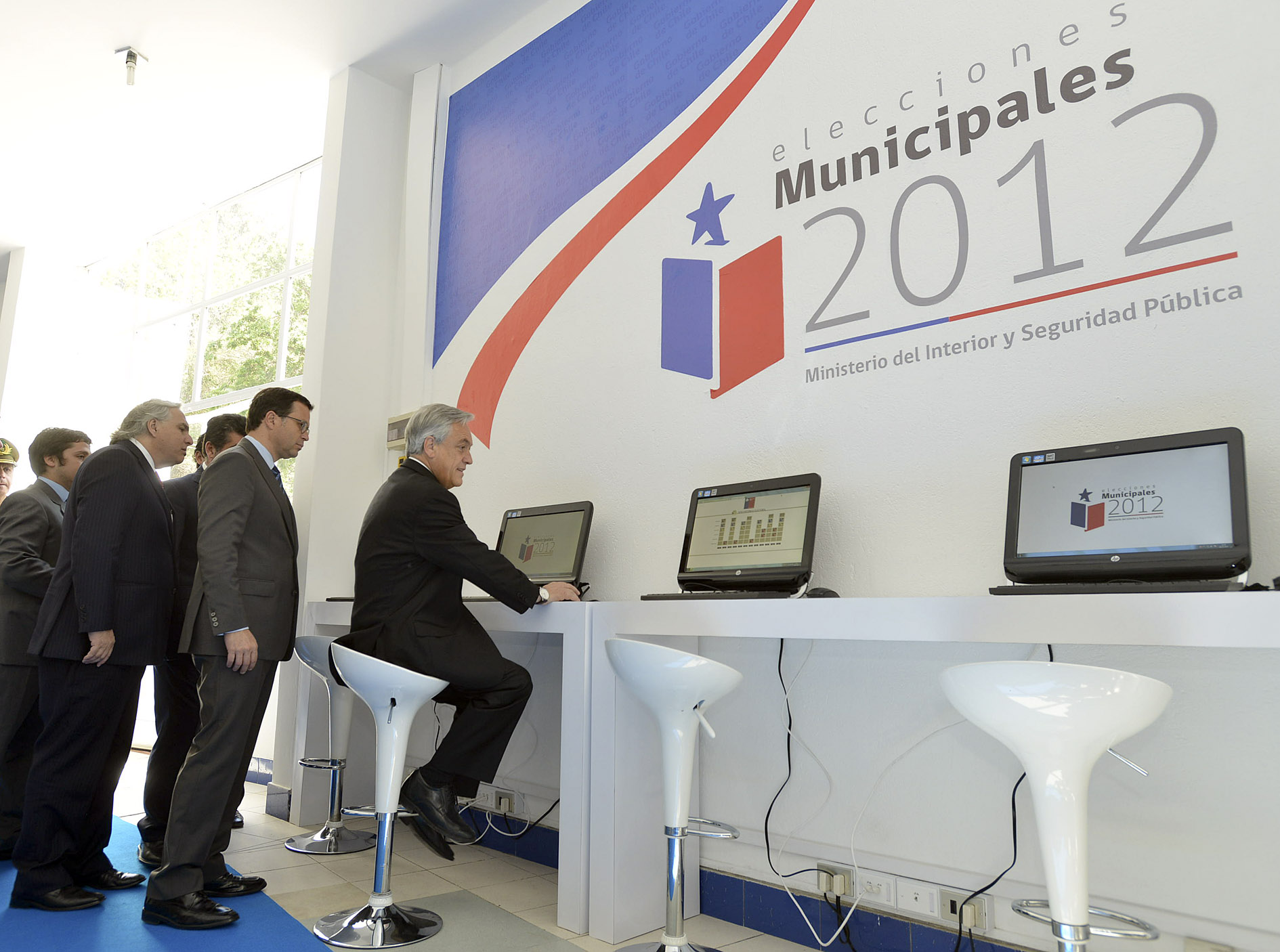 Centro de Prensa votaciones municipales 2012.